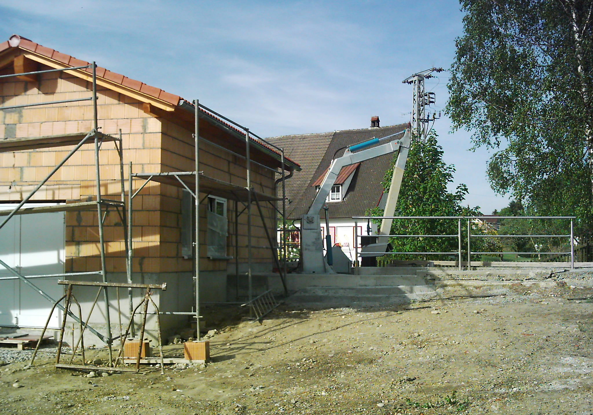 Binnrot (Wasserwerk) - Maschinenhaus mit Turbine und dem Rechen außen